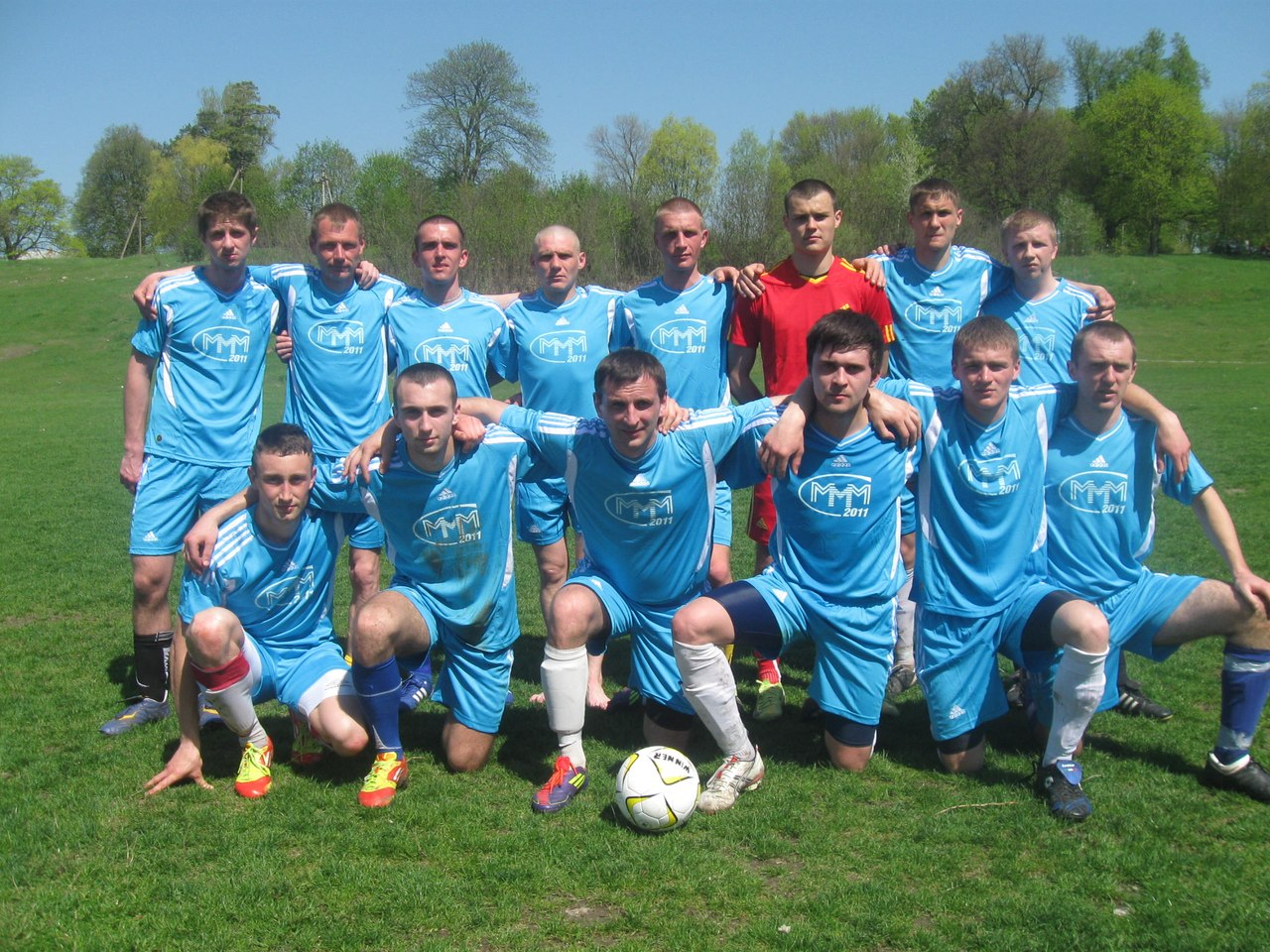 ФК "Промінь" перед початком змагань 2012-2013.